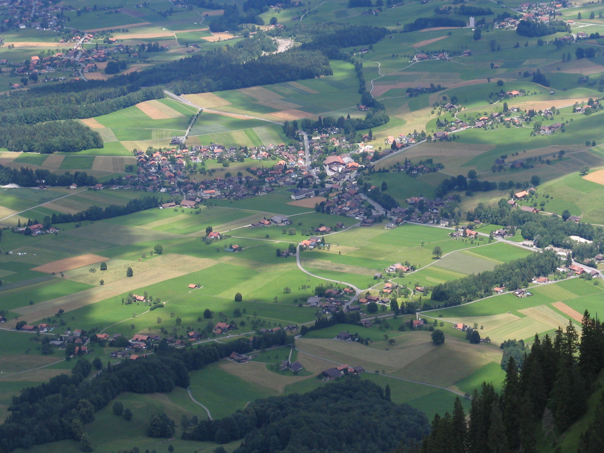 Blumenstein, Dorf und Gemeinde im Kanton Bern (Schweiz/Switzerland) von Süden, genauer vom Walalpgrat aus gesehen.